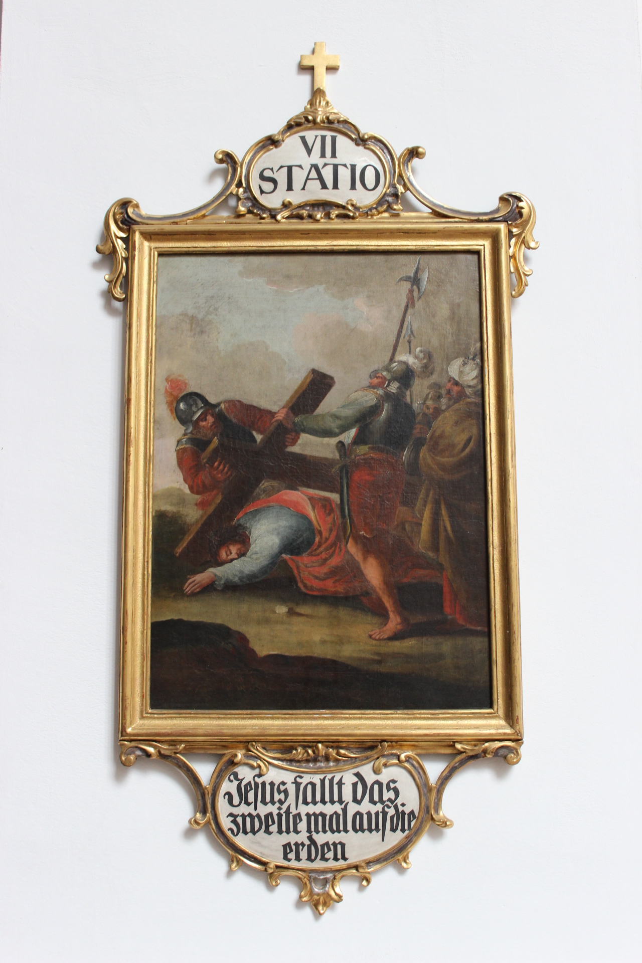 7. Station des Kreuzwegs der Heidelberger Jesuitenkirche